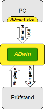 Vom Ersteller freigegeben.